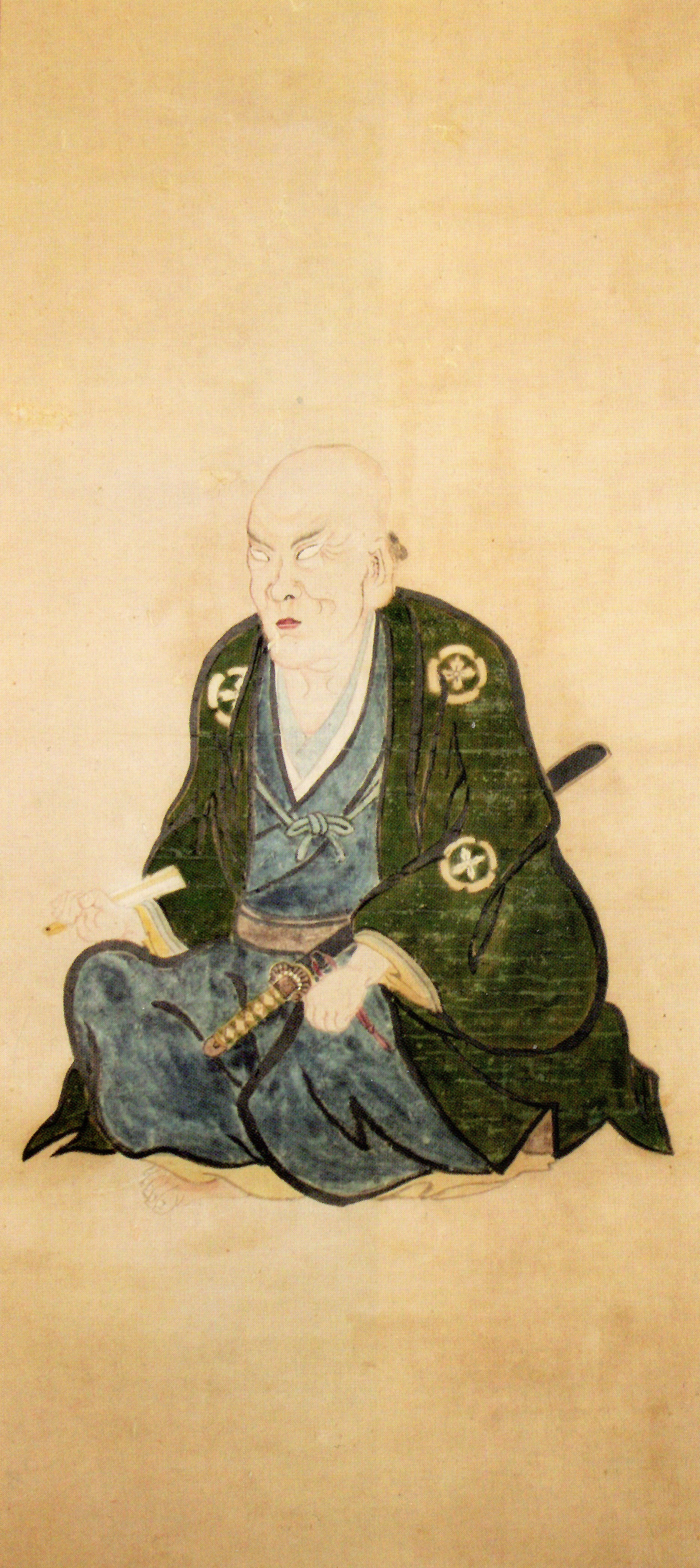 富田勢源の肖像。